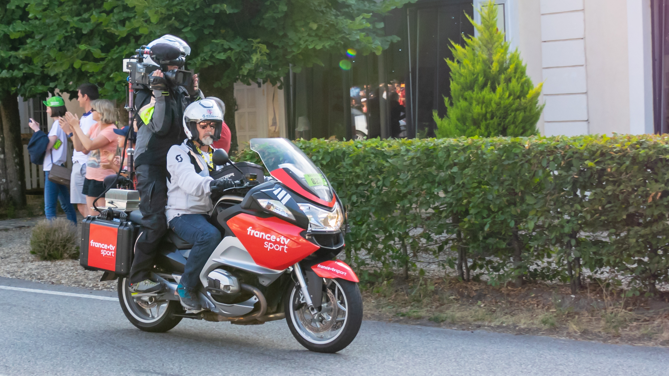 Souriez, vous êtes filmés !